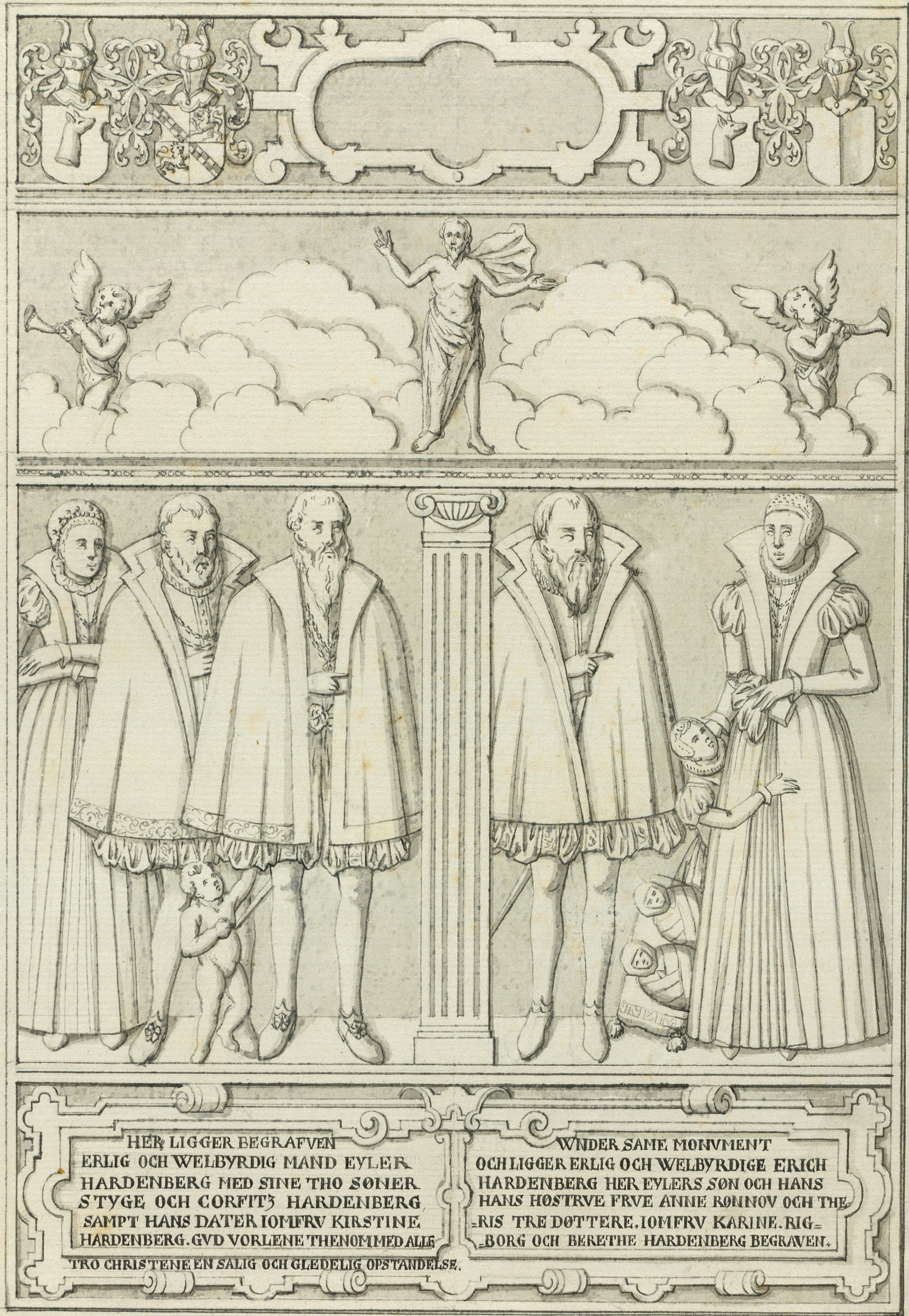 Denne Gravsteen o.1575, som er af Askegraa Marmor over Ejler Hardenberg, †1565 med sine to voksne børn, Stygge (†1555) og Kristine, samt dennes søn Erik Hardenberg (†1604) med hustruen Anne Rønnow (†1609) og deres tre døde døtre Karine, Rigborg og Berethe., findes i Choret paa Nordre Side i Klovborg Kirke i Vrads Herred. S: Abildgaard. 1773. 26 x 39 cm